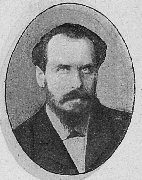 Григорий Иванович Баскин (6 апреля 1866, Елабуга — 1940, Куйбышев) — земский статистик, народный социалист, депутат II Государственной думы Российской империи от Пермской губернии, профессор Самарского университета.